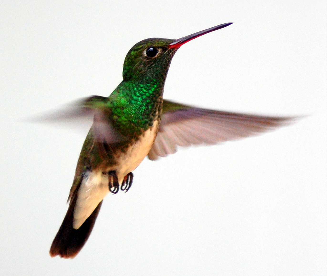 No jardim da minha sogra em Registro-SP BEIJA-FLOR-DE-GARGANTA-VERDE ( Amazilia fimbriata )BEIJA-FLOR-DE-GARGANTA-VERDE ( Amazilia fimbriata )